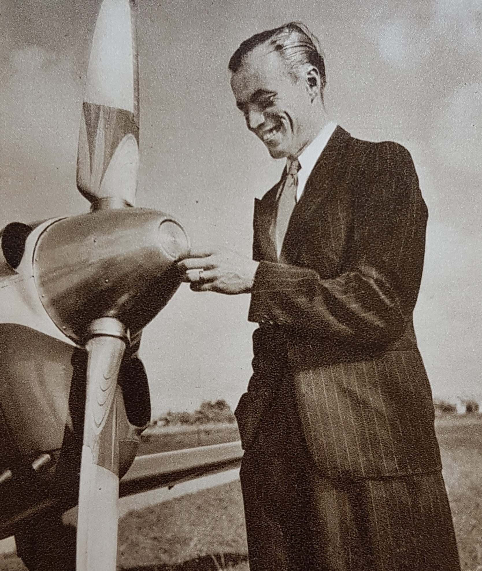 Erik Bratt demonstrerar sin Dynamicpropeller